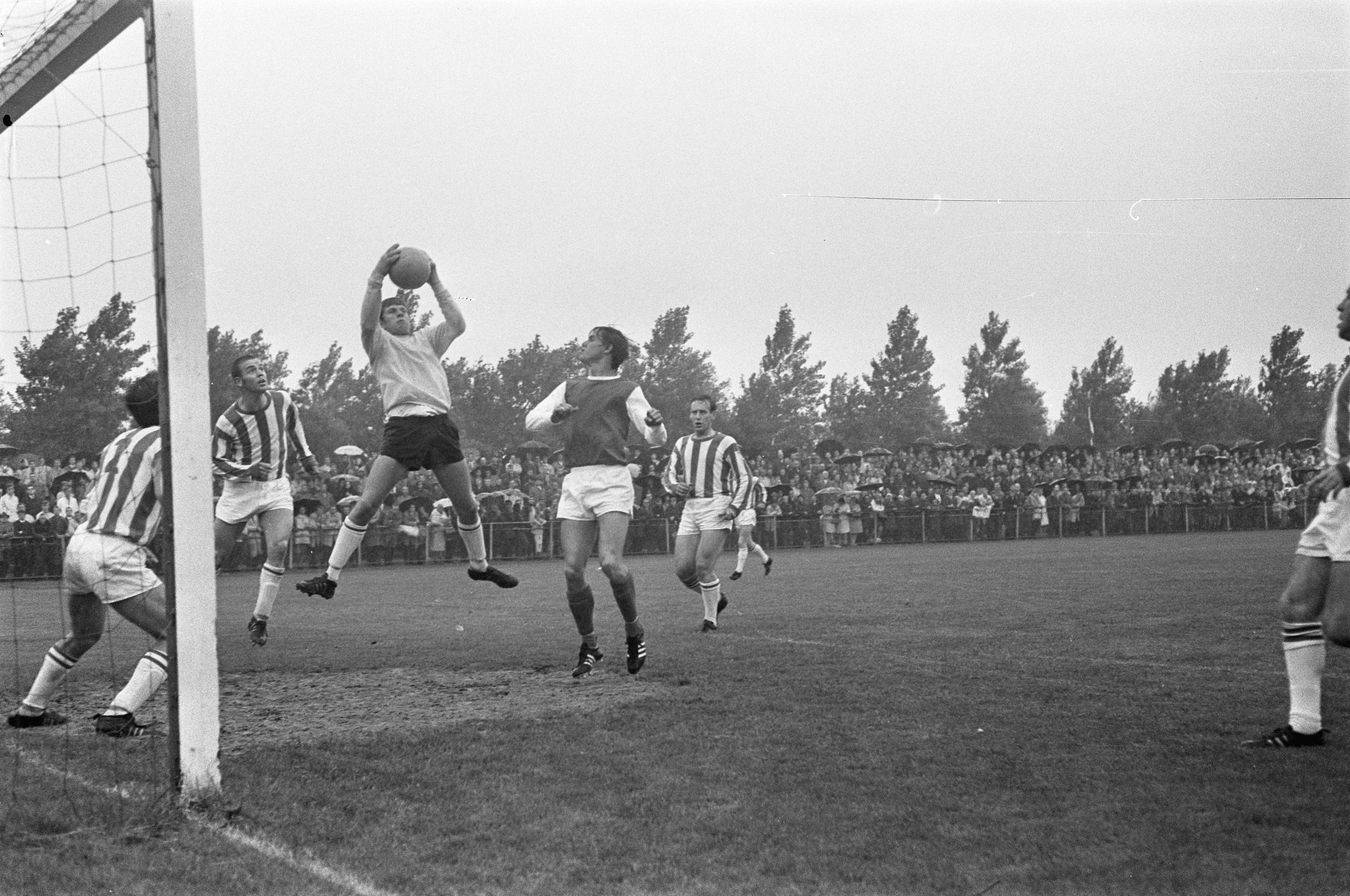 Collectie / Archief : Fotocollectie Anefo Reportage / Serie : [ onbekend ] Beschrijving : Kampioenschap Zondag-Amateurs. DCG tegen UVS 2-3. Keeper Sloos (UVS) onderschept aanval Datum : 6 juli 1968 Locatie : Amsterdam Trefwoorden : sport, voetbal Fotograaf : Koch, Eric / Anefo Auteursrechthebbende : Nationaal Archief Materiaalsoort : Negatief (zwart/wit) Nummer archiefinventaris : bekijk toegang 2.24.01.05 Bestanddeelnummer : 921-4922